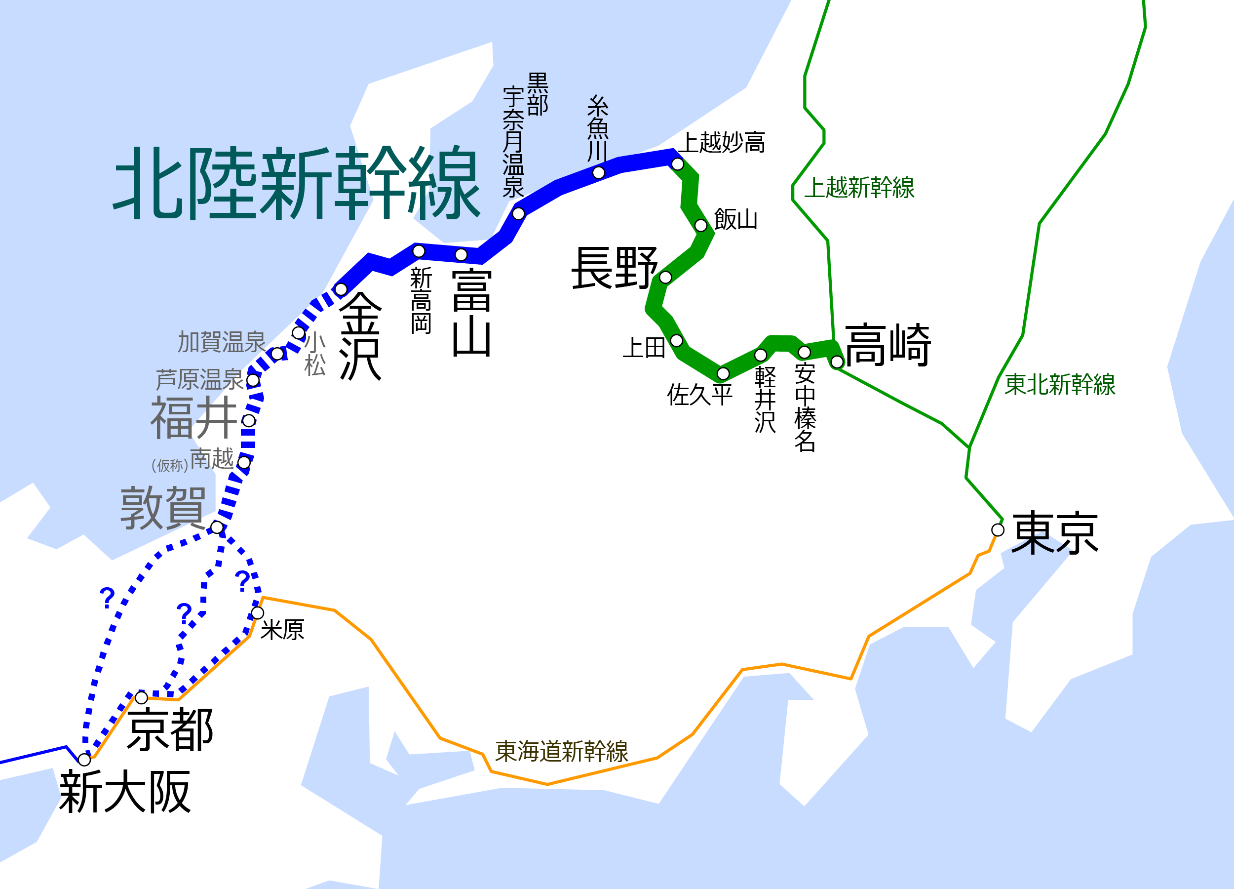 北陸新幹線(長野新幹線)の路線図